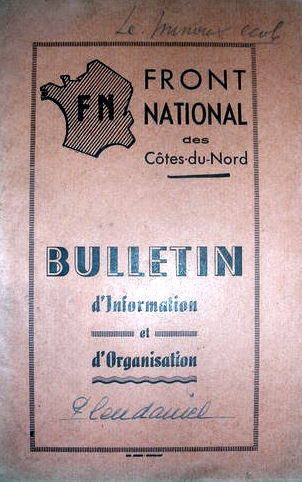 Bulletin d'information et d'organisation du Front National, section des Côtes-du-Nord, 1946/